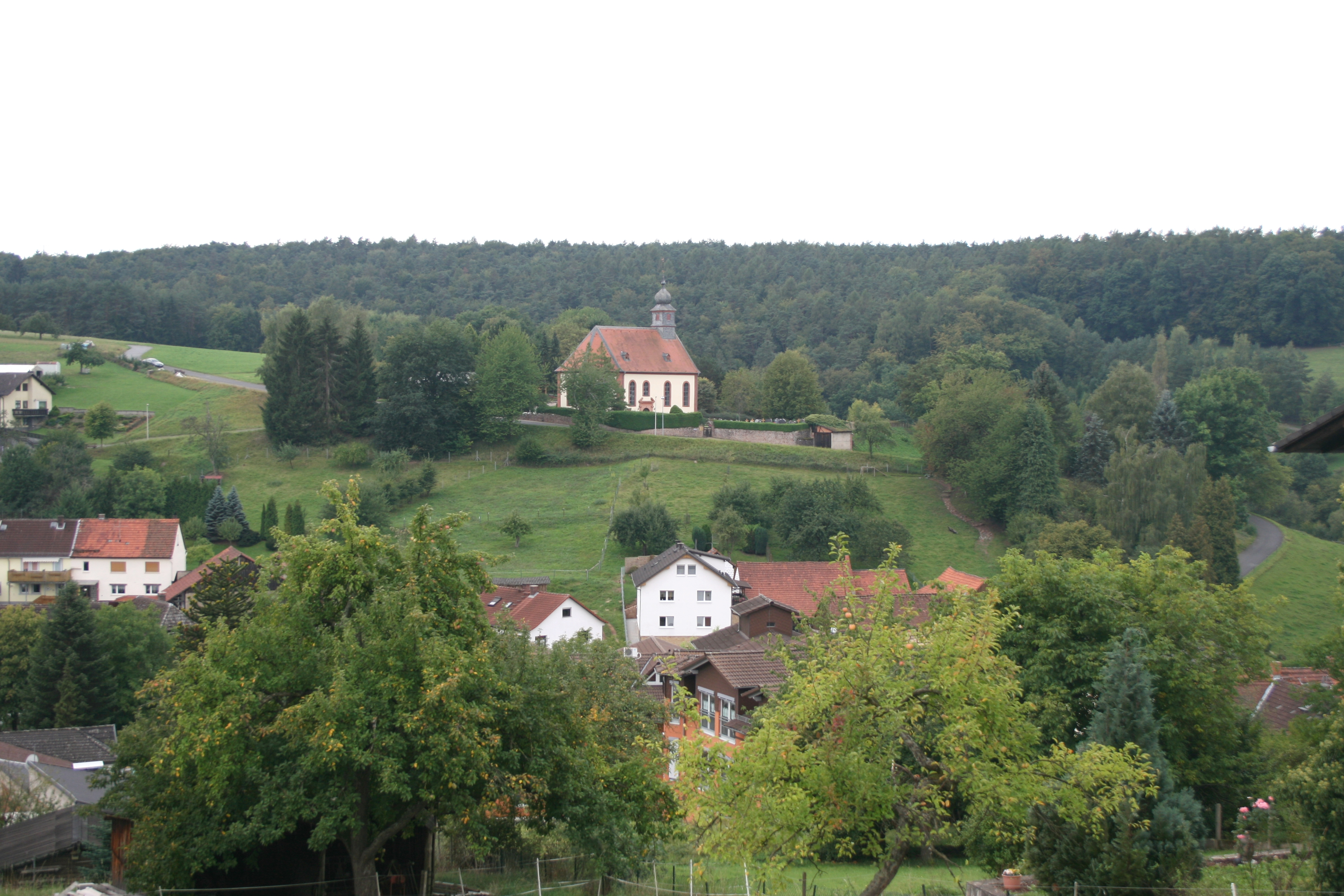 Lützelbach im Odenwaldkreis, Blick auf die Kirche von Osten.